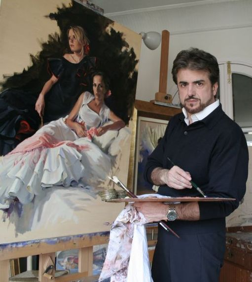 Foto del pintor Ricardo Sanz en su taller